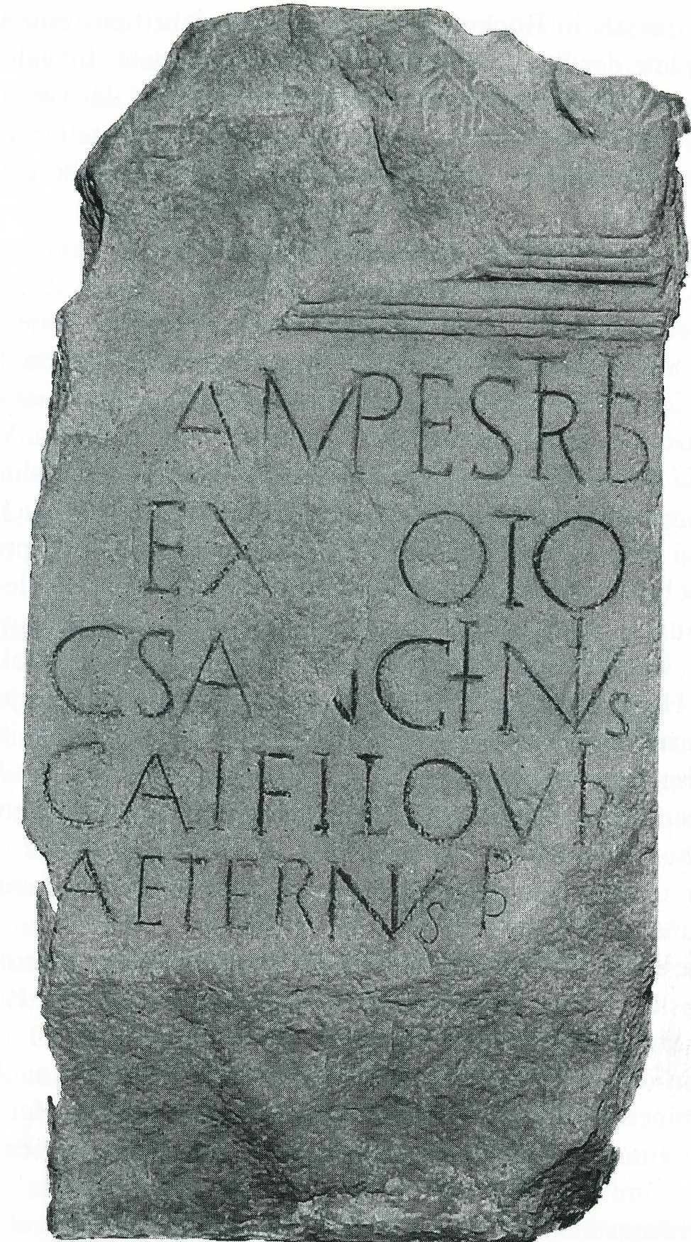 Römischer Altarstein aus Heilbronn-Böckingen mit Inschrift für die Schutzgöttinnen des Exerzierplatzes im Auftrag von Gaius Sanctinius Aeternus Sohn des Gaius aus der Quirinischen Tribus Befehlshaber, Inschrift CIL XIII 6470: [C]AMPESTRIB[VS]/ EX V[O]TO/ C(aius) SANCTINVS/ GAI FIL[IVS] QVIR[INA] / AETERNVS PR[AEPOSITVS] PR[AEFECTVS]